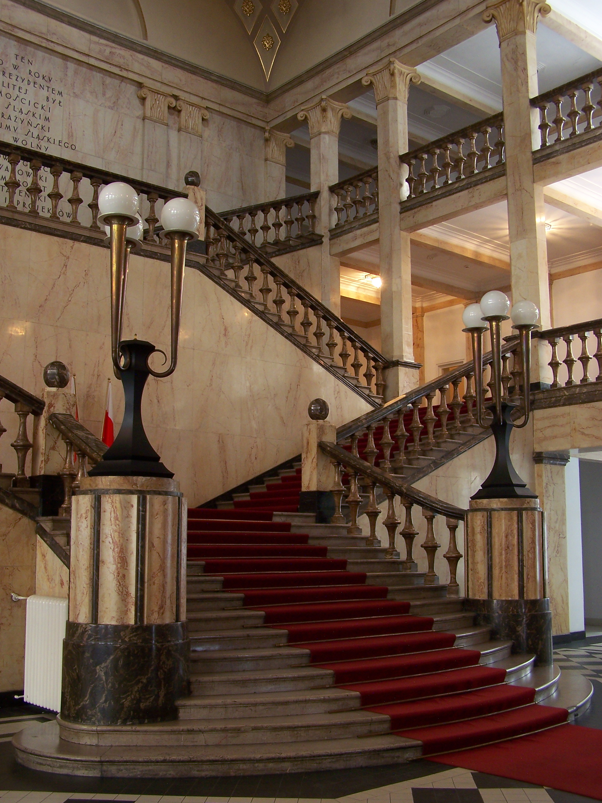 Schlesisches Parlament Innen.